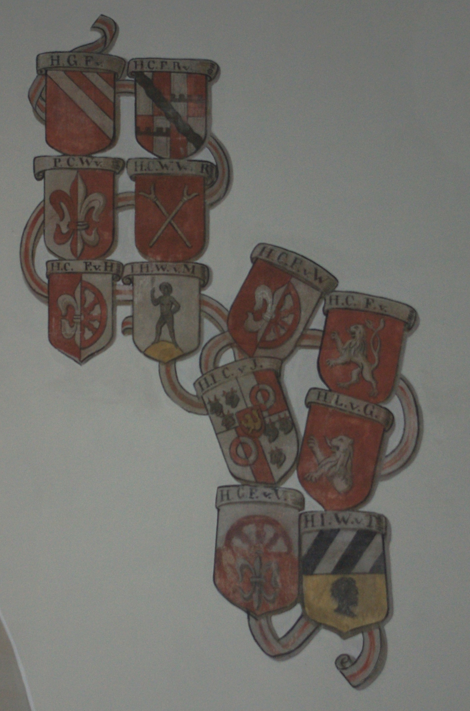 Wandgemälde mit Wappen (Teil links oben von 1770, Teil rechts unten von 1711) von Nürnberger Patriziern in der Egidienkirche in Erlangen-Eltersdorf. Die Wappen von links oben nach rechts unten: Georg Friedrich von Poemer (H.G.F.v.), Carl Friedrich Reichsfreiherr von Behaim (H.C.F.R.v.), Paul Carl Welser (H.P.C.v.), Christoph Wilhelm Waldstromer von Reichelsdorf (H.C.W.W. R.), Christoph Carl Fürer von Haimendorf (H.C. F.v.H.), Johann Jacob Winkler von Mohrenfels (J.H.W.v.M.), Christoph Fürer von Haimendorf auf Wolkersdorf (H.C.F.v.W.), Christoph Elias Oelhafen (H.C.E.v.), Johann Christoph von Imhoff (H.I.C.v.J.), Leonhard von Grundherr (H.L.v.G.), Georg Friedrich von Volckamer (H.G.F.v.V.), Jobst Wilhelm von Tucher (H.I.W.v.T.)